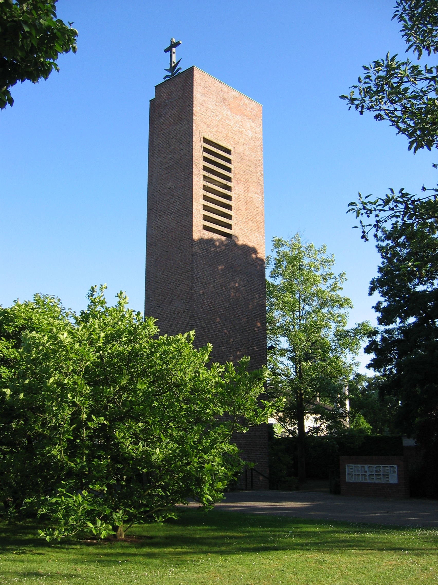 Turm der evangelischen Erlöserkirche in Köln-Rodenkirchen.